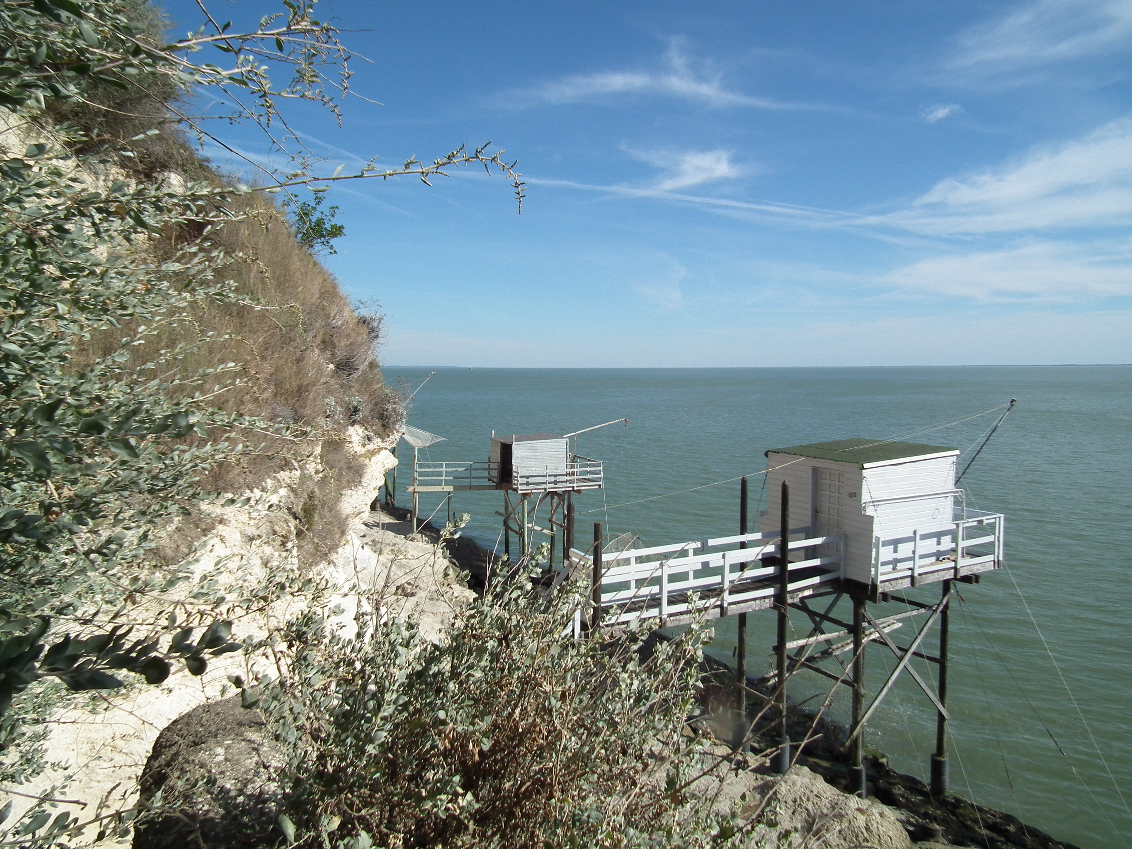 Carrelets à Meschers